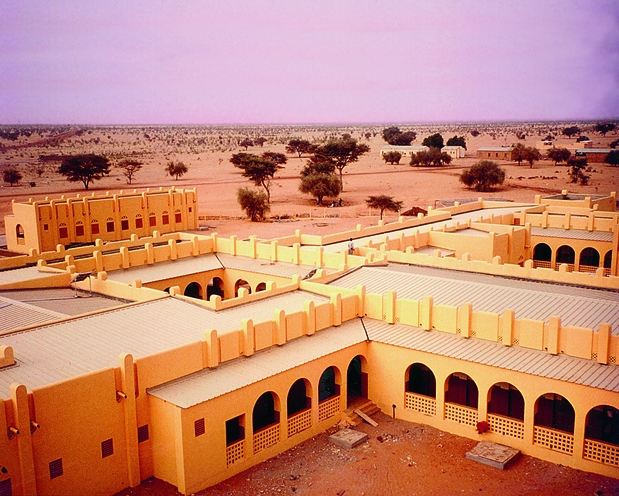 Krankenhaus in Mali, Afrika